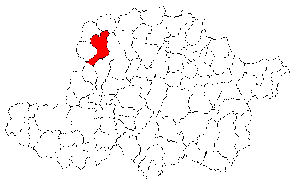 Categorie:Hărţi ale judeţului Arad